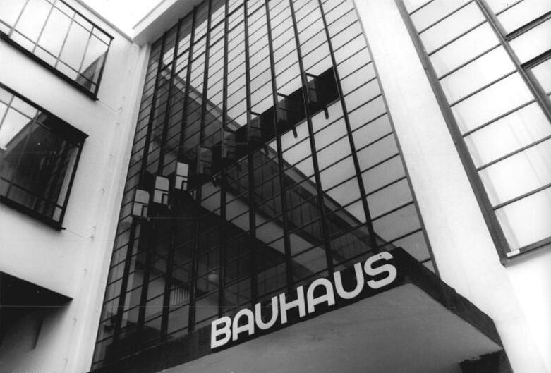 Dessau, Bauhaus ADN-ZB Lehmann 27.5.1988 Bez. Halle: 775 Jahre Dessau-Weltbekannt wurde die Stadt durch das Bauhaus, entworfen von Walter Gropius. Der mit denkmalspflegerischer Sorgfalt rekonstruierte Gebäudekomplex ist eine traditionsreiche Forschungs- und Bildungsstätte für Städteplaner, Architekten, industrielle Formgestalter und bildende Künstler der DDR.